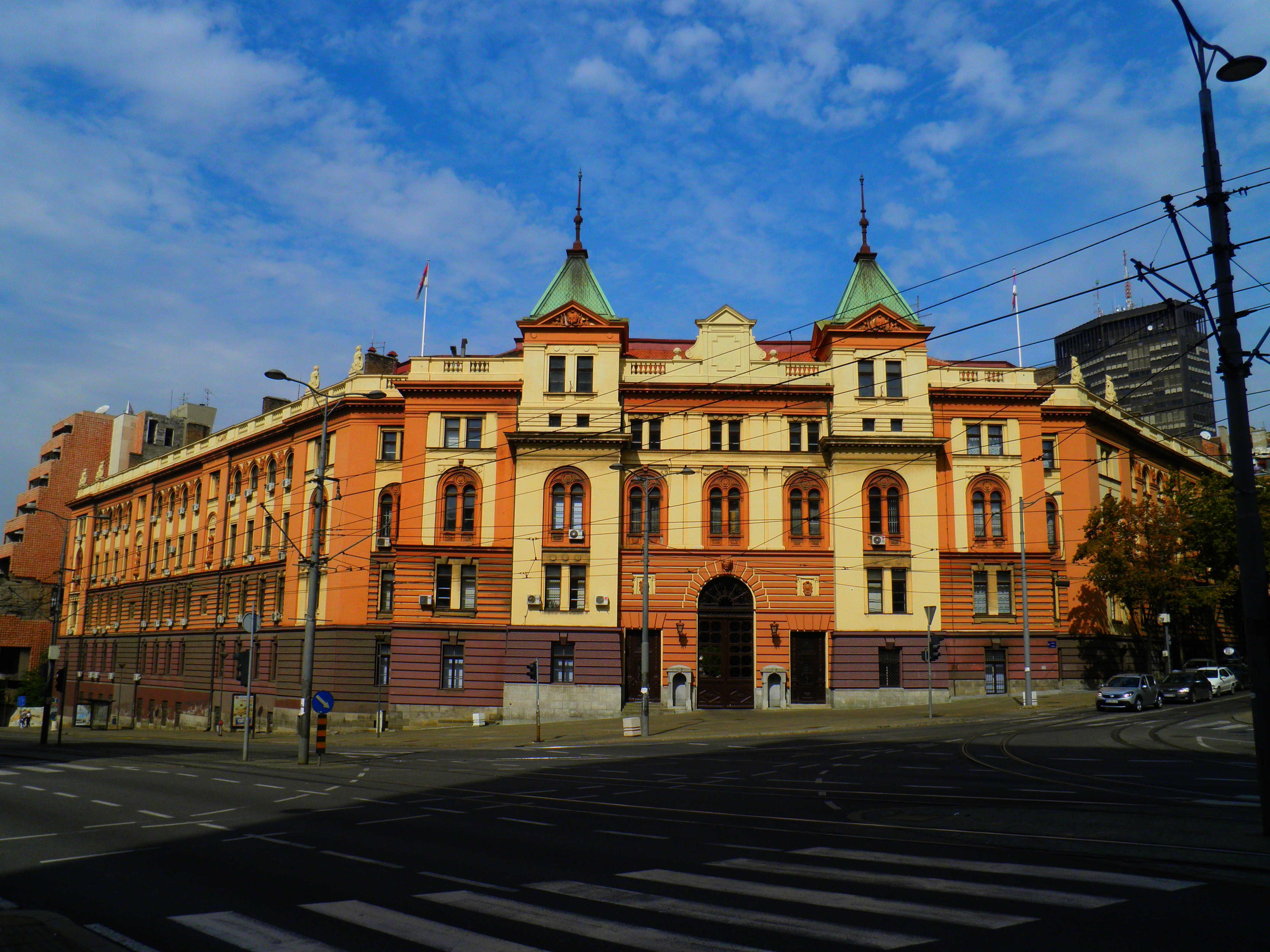 Nemanjina